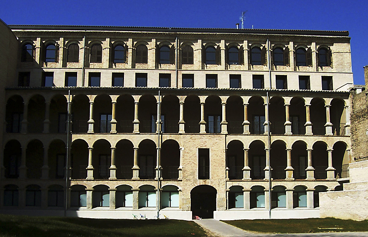 Photo:Baltasar García S